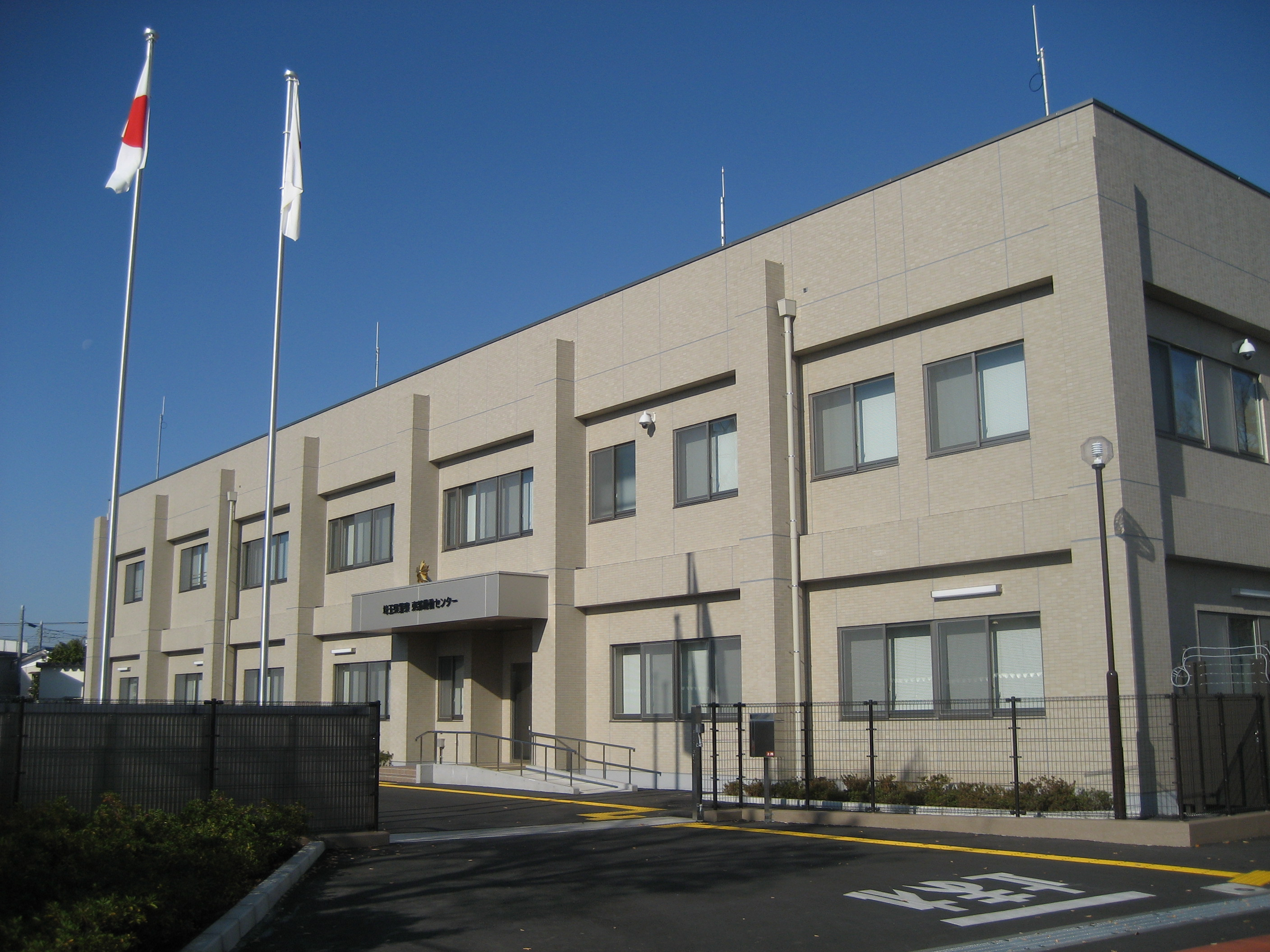 埼玉県警察東部機動センター庁舎